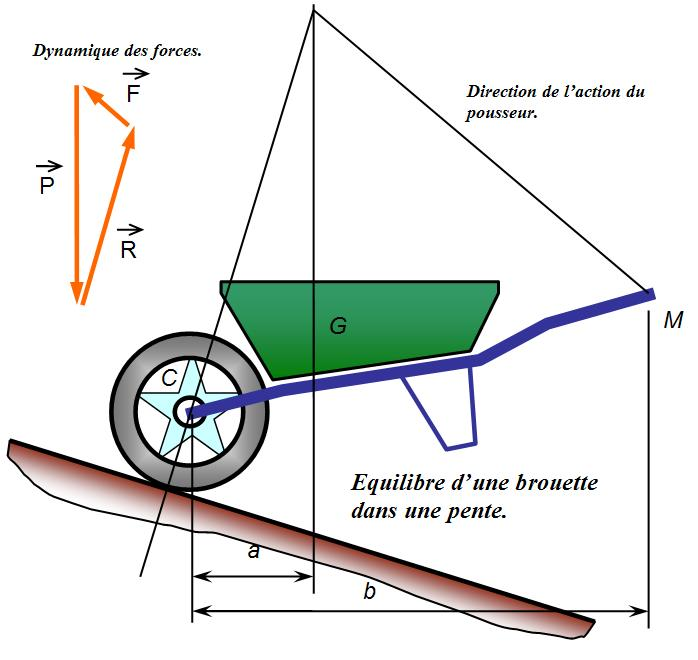 Étude d’une brouette statique. Les longueurs des vecteurs sont en proportion avec les forces qu'ils représentent.